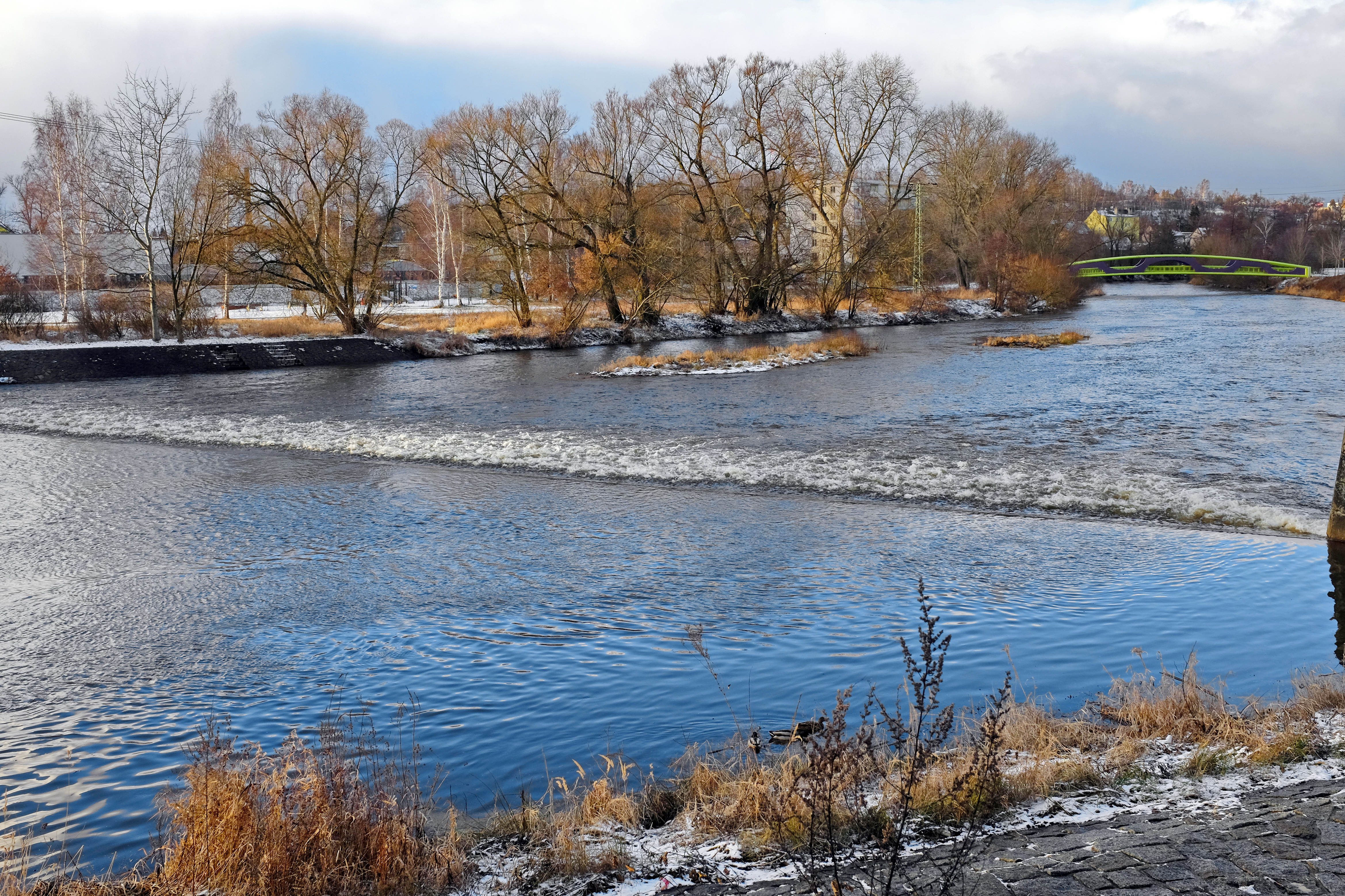 Karlovy Vary-Tuhnice Tuhnický jez